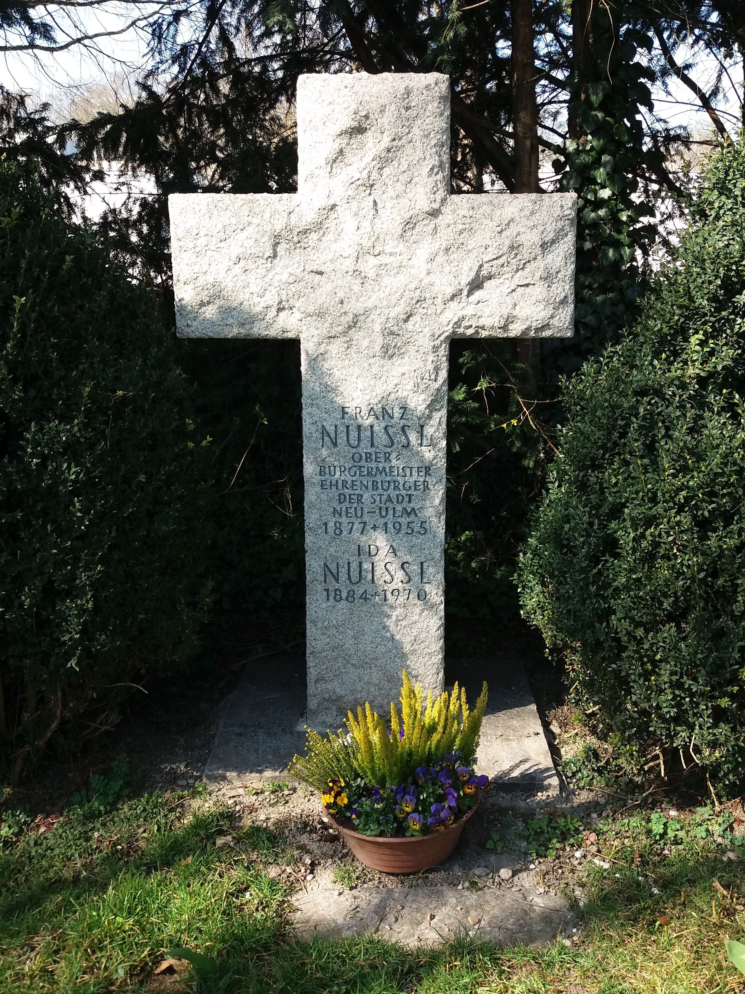 Grab Nuissl auf dem Neu-Ulmer Hauptfriedhof